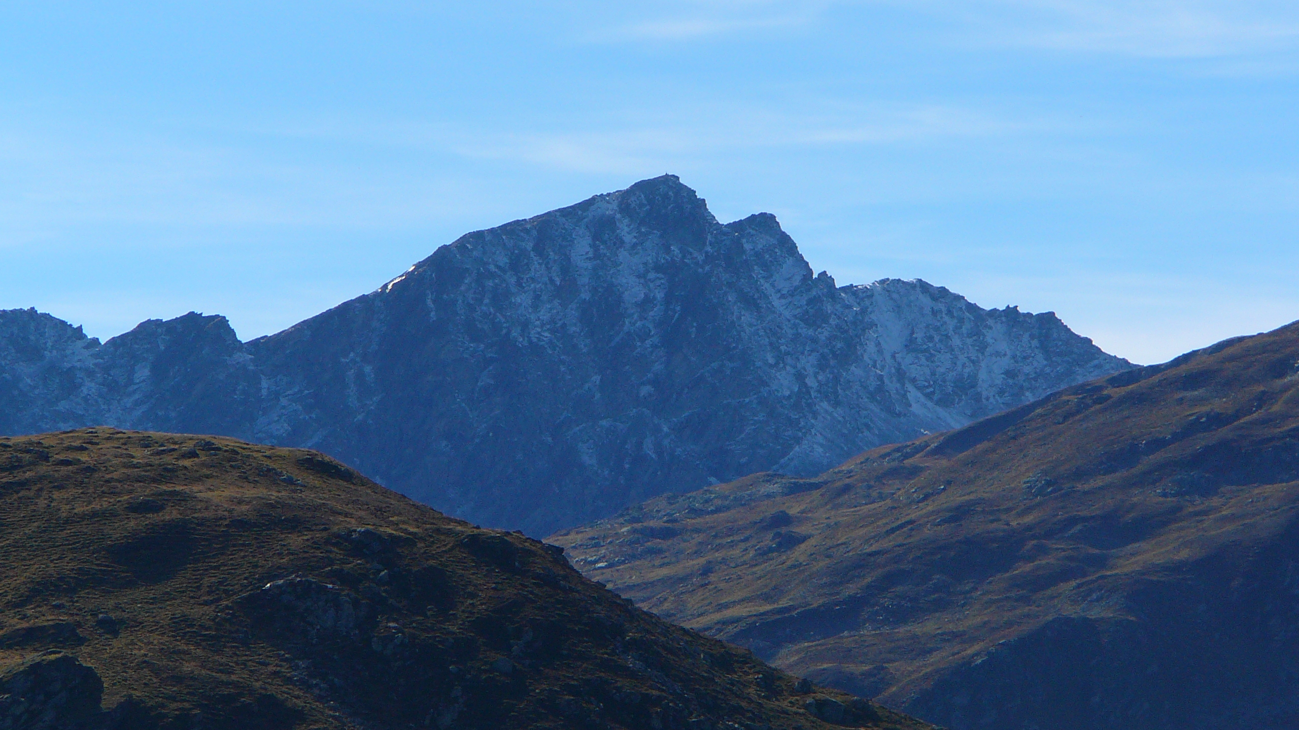 Schwarzhorn